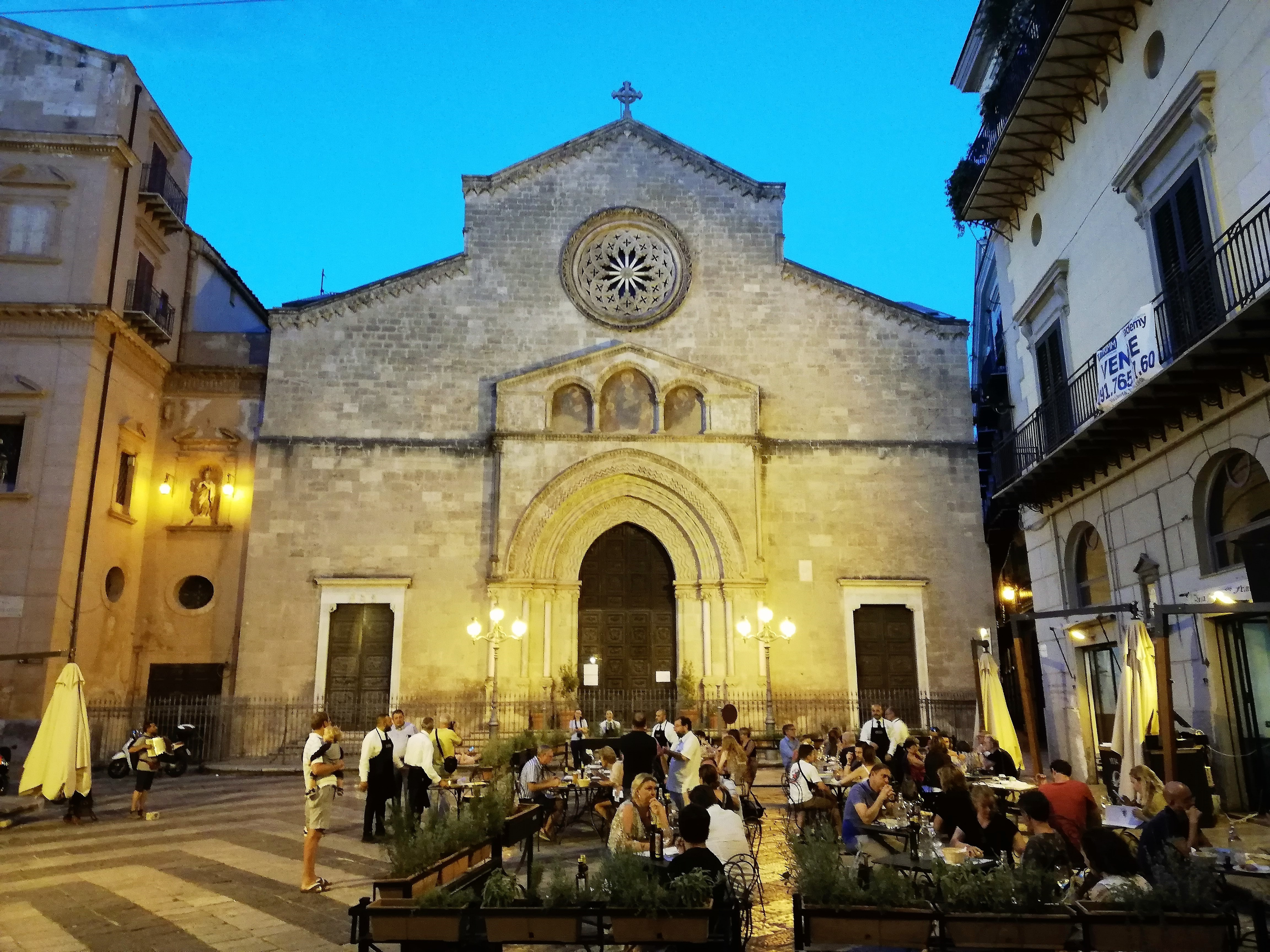 Chiesa di San Francesco d'Assisi al tramonto.